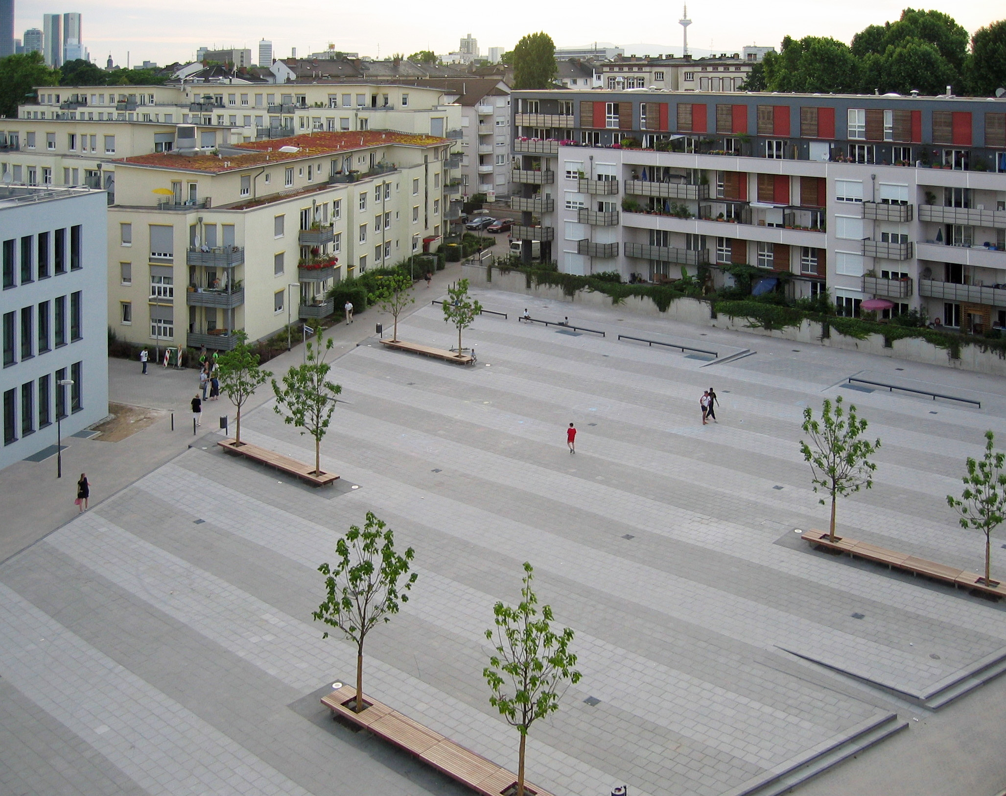 Kategorie:Bild:Bauwerk (Original text: Frankfurt am Main: Ostend mit Paul-Arnsberg-Platz)